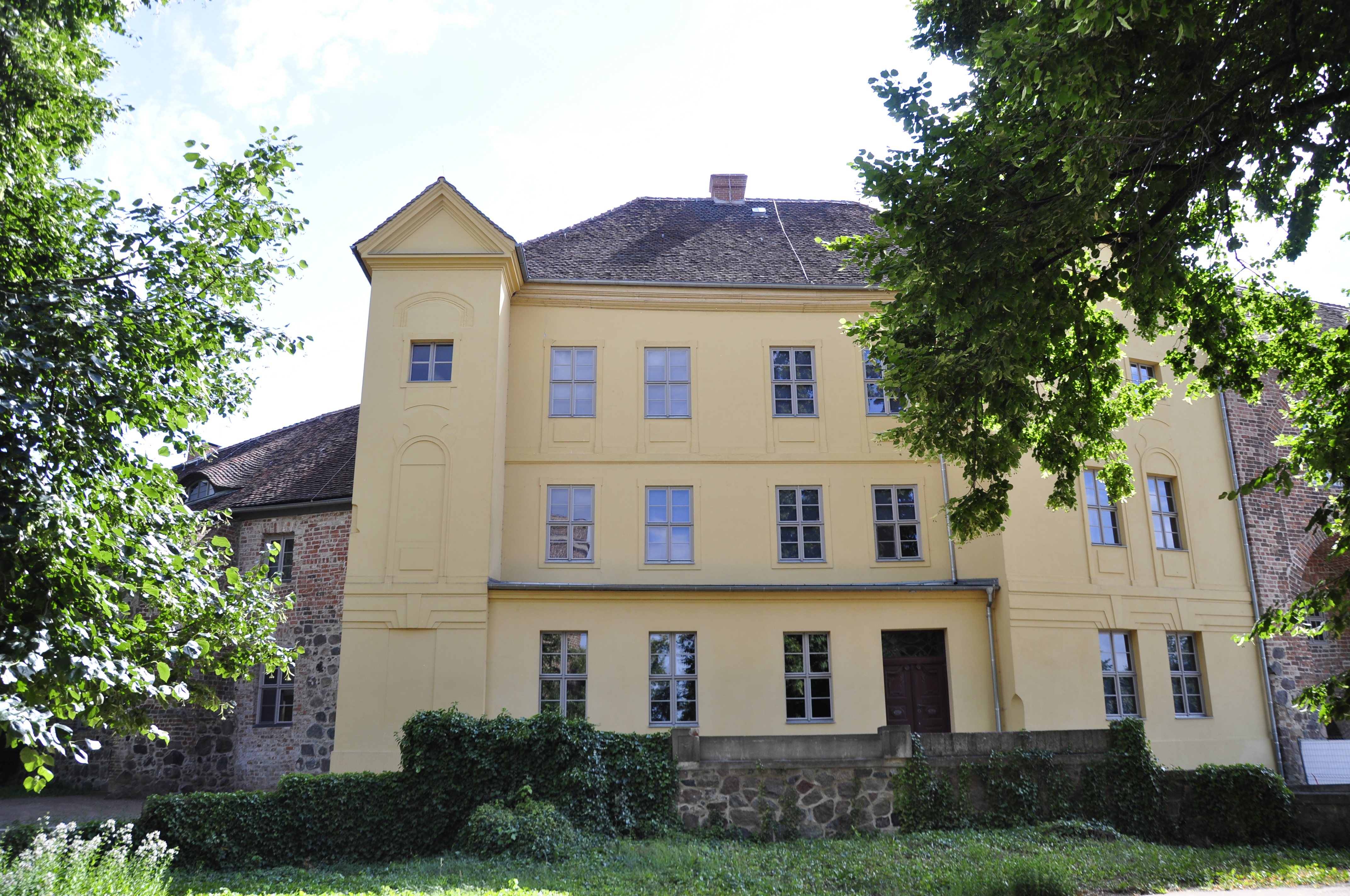 Burg Ziesar